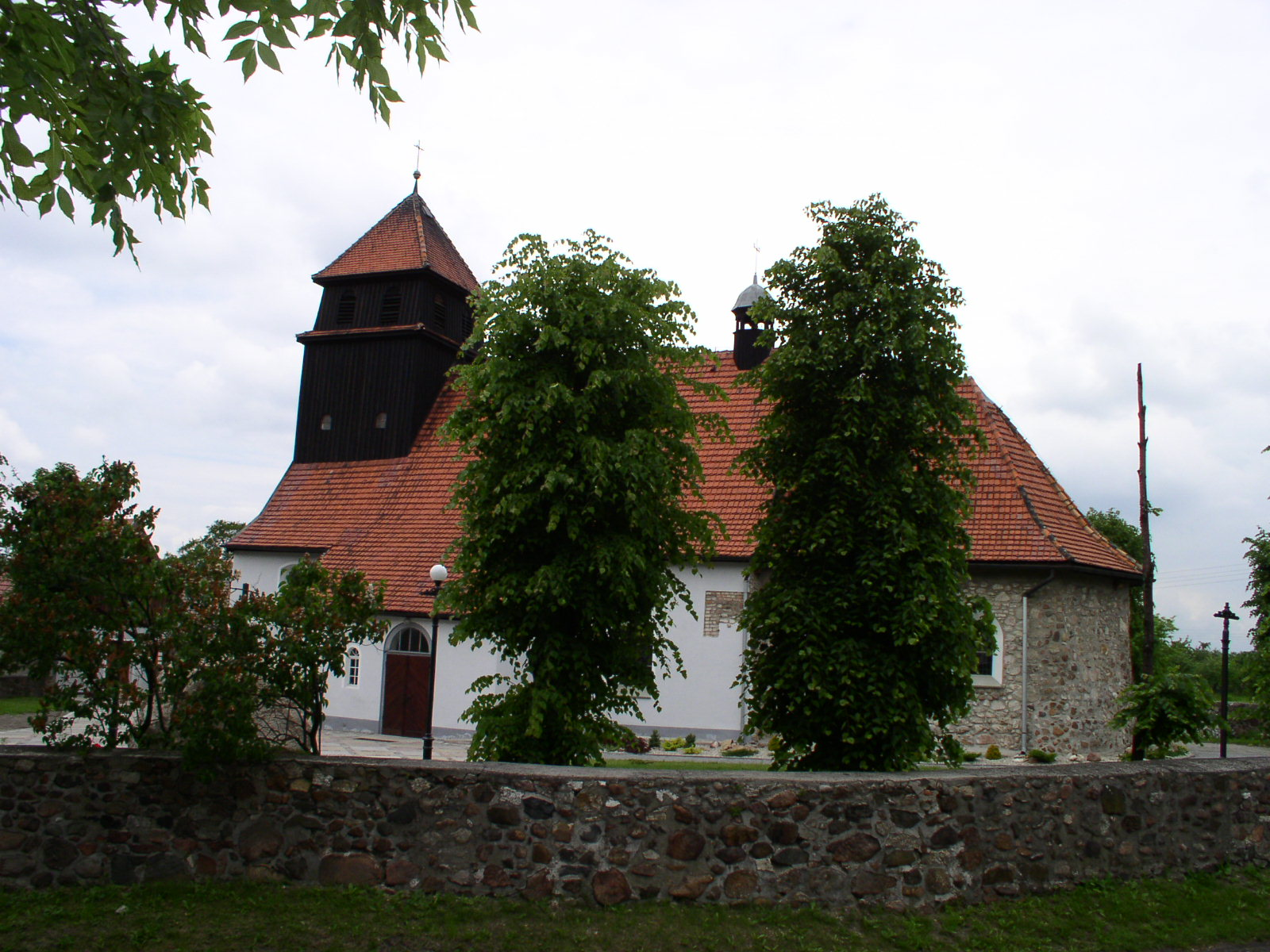 Kozłów,Polska